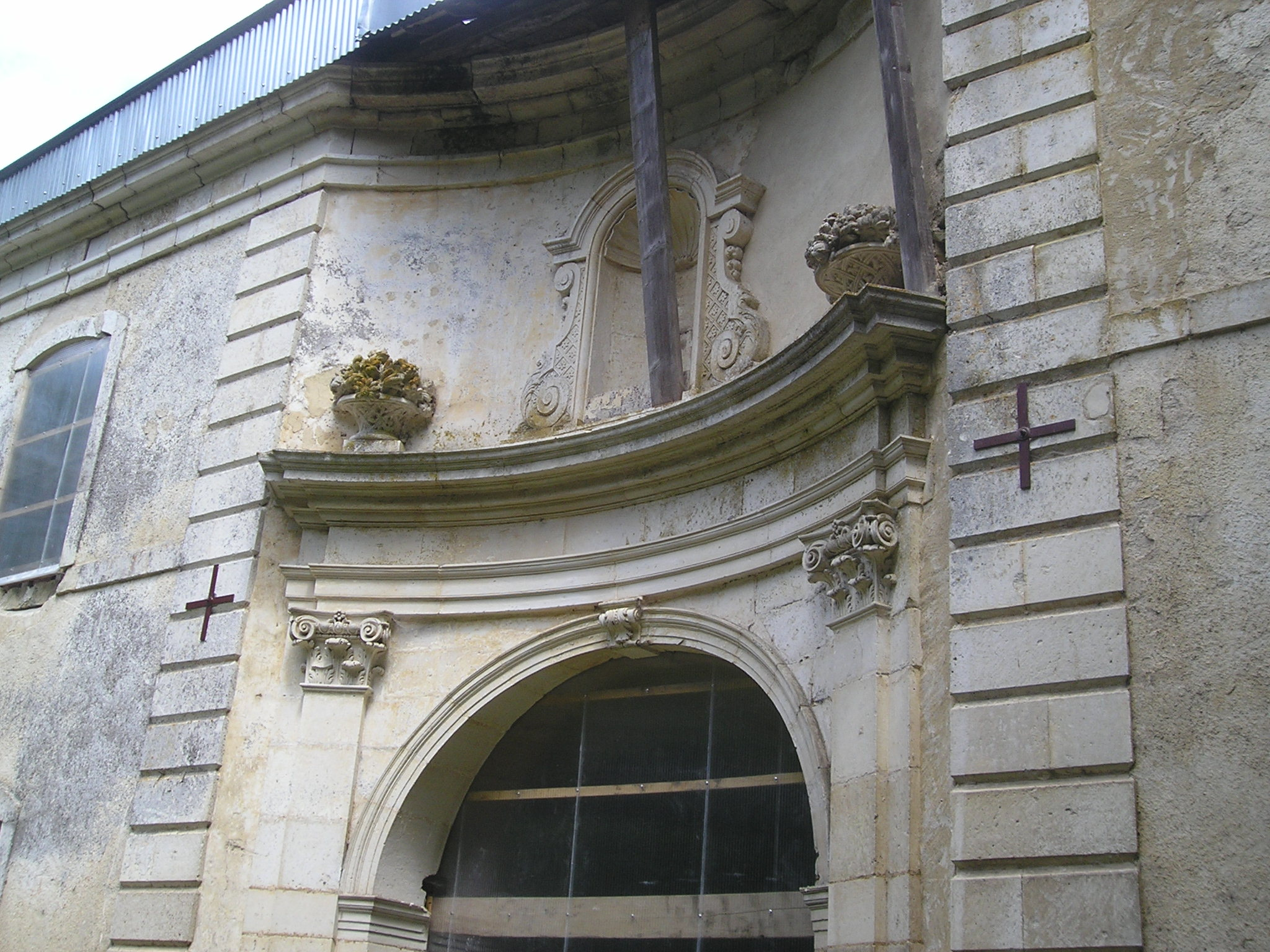 Porterie de l'abbaye de la Crête (Haute-Marne, France)